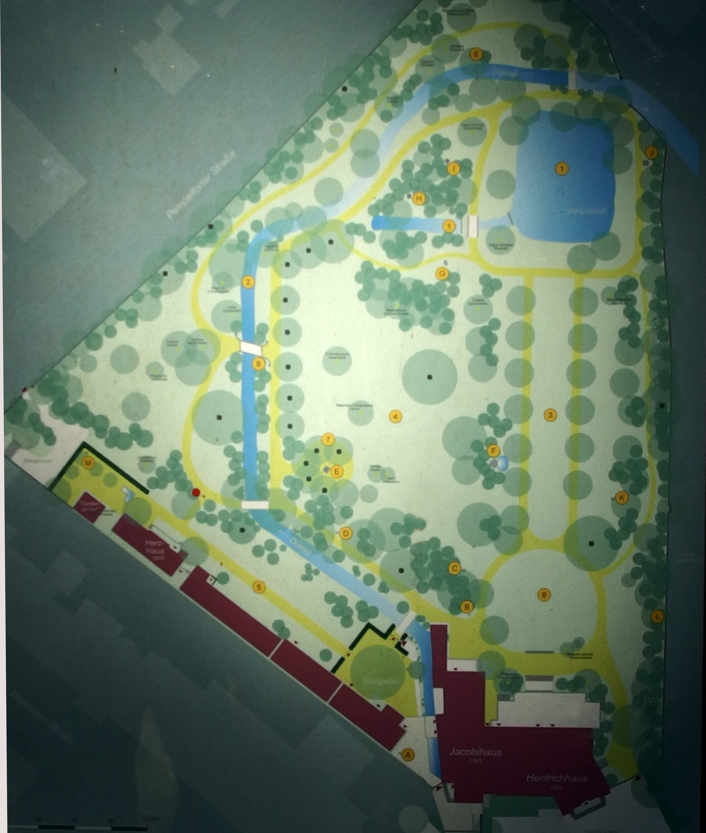 Plan Parkanlage Künstlerverein Malkasten, Düsseldorf